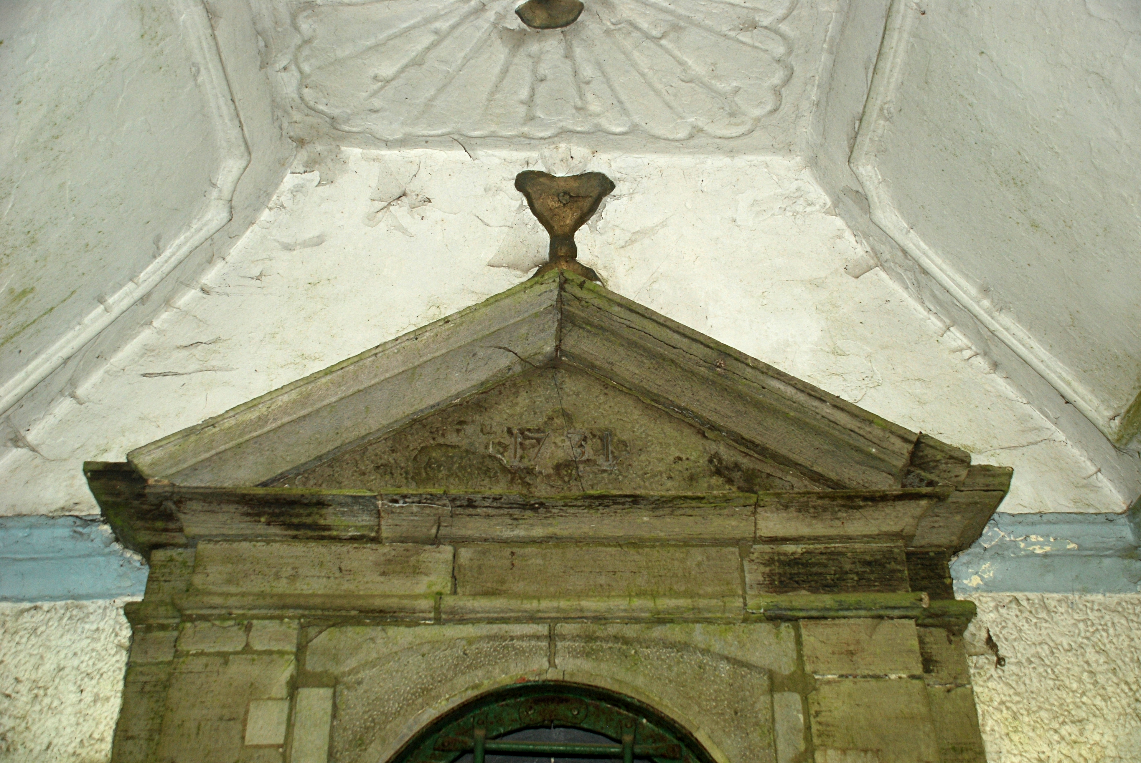 Belgique - Brabant wallon - Villers-la-Ville - Chapelle Notre-Dame des Affligés